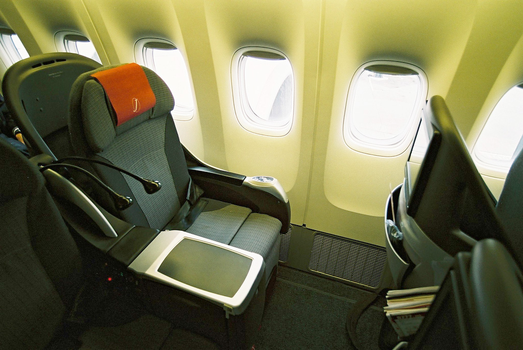 日本航空(JL/JAL)3002便 東京(成田)ゆき は、国際線仕様のB777-346ERなので、Class J が国際線のFクラス/Cクラスの座席です。 ただし、Fクラスは成田から国際線のFクラスに乗り継ぐお客さんと、JALマイレージバンクの上級会員(ダイヤモンド/JGCプレミア)のためにブロックされていて、一般の予約は受け付けてくれません。 それでもCクラスのシェルフラットシートに Class J 価格で座れるのだからお徳ですね。 (2007/01/28 JL3002, Osaka International Airport, JAPAN)